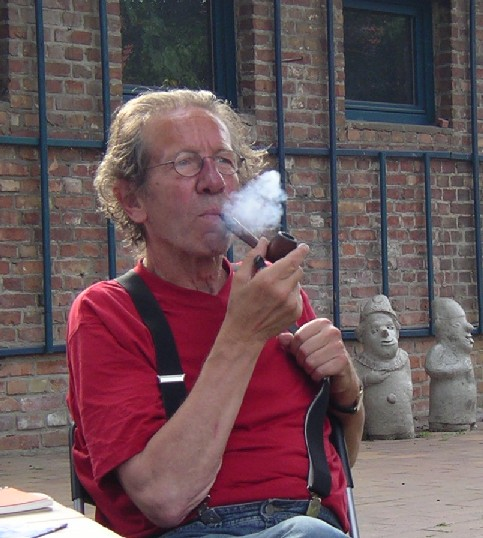 Der Maler Hans-Otto Schmidt während einer Ausstellungseröffnung in Bergsdorf.